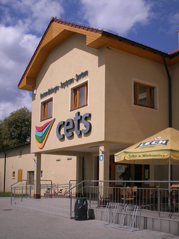 CEST w Krośnicach (woj. dolnosląskie)